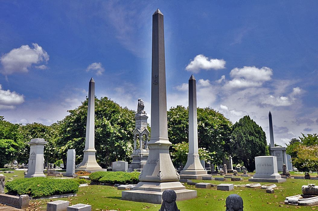 Elmwood Cemetery, Memphis